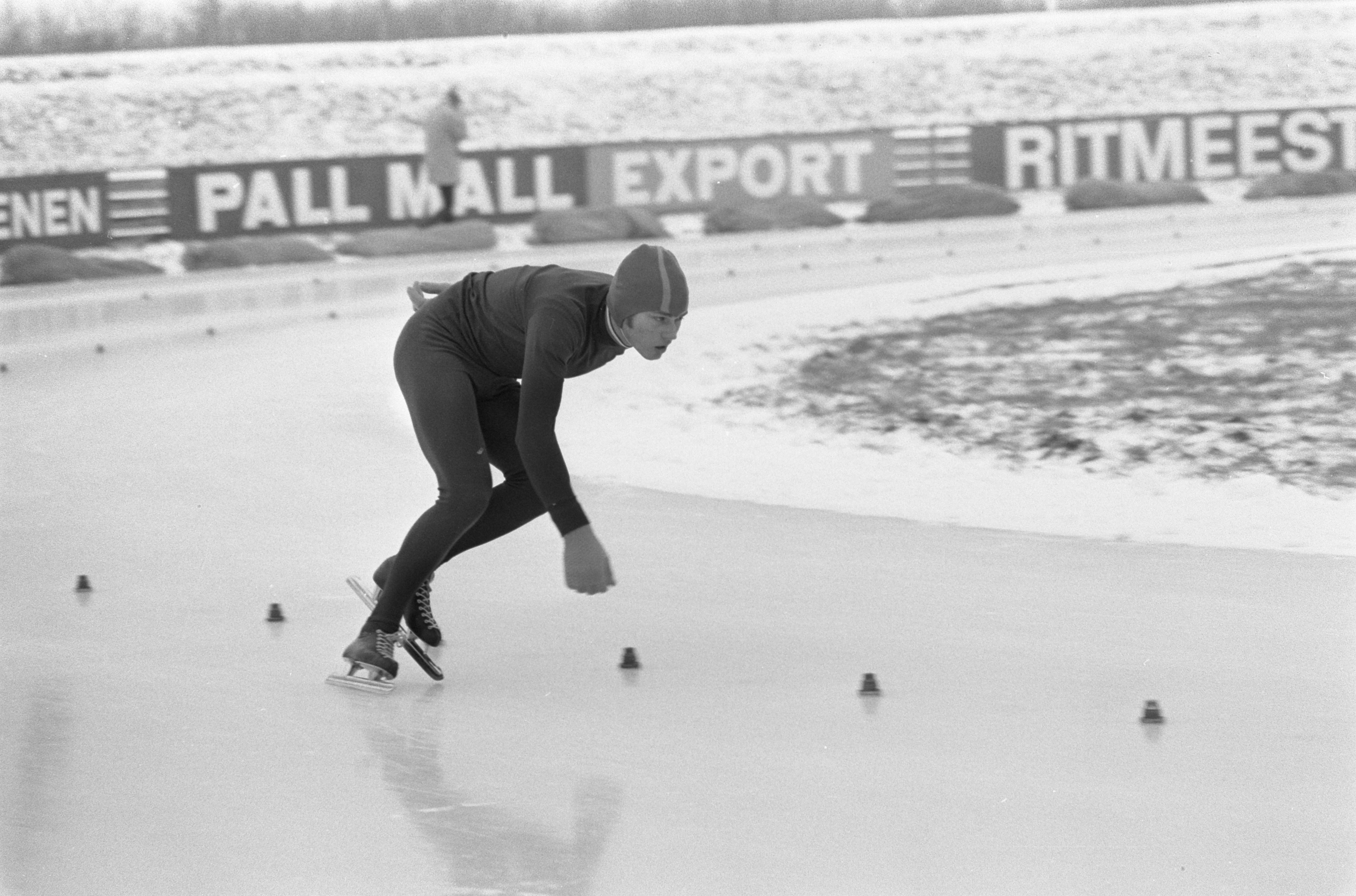 Collectie / Archief : Fotocollectie Anefo Reportage / Serie : [ onbekend ] Beschrijving : Nederlandse kampioenschappen hardrijden langebaan te Herenveen Winnaar bij Jongens A werd C. Giling Datum : 18 januari 1970 Locatie : Friesland, Heerenveen Trefwoorden : KAMPIOENSCHAPPEN, schaatsen, sport Persoonsnaam : C. Giling Fotograaf : Mieremet, Rob / Anefo Auteursrechthebbende : Nationaal Archief Materiaalsoort : Negatief (zwart/wit) Nummer archiefinventaris : bekijk toegang 2.24.01.05 Bestanddeelnummer : 923-1715